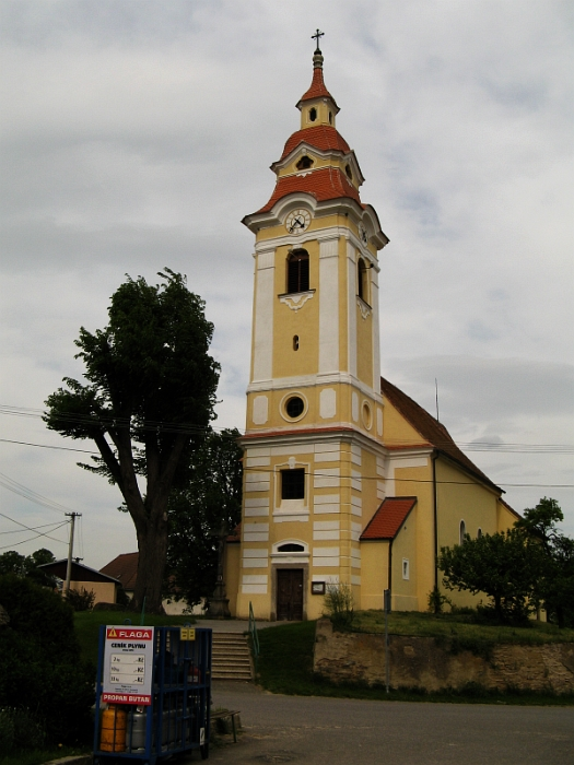 Kostel Stětí sv. Jana Křtitele (Starý Petřín), Starý Petřín